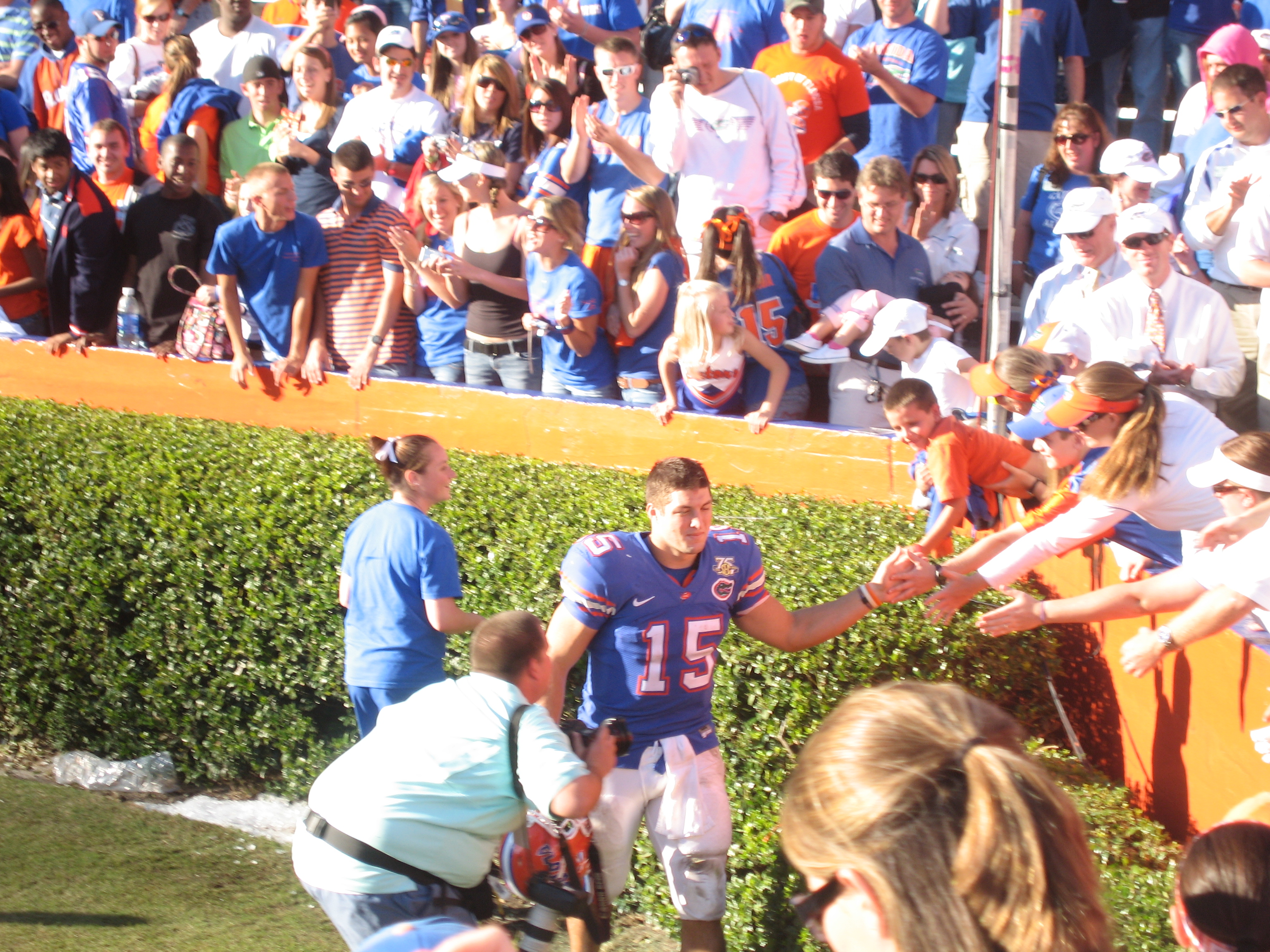 Tim Tebow au Ben Hill Griffin Stadium de l'Université de Floride le 17 Novembre 2007 après la victoire des Gators contre Florida Atlantic 59 à 20.